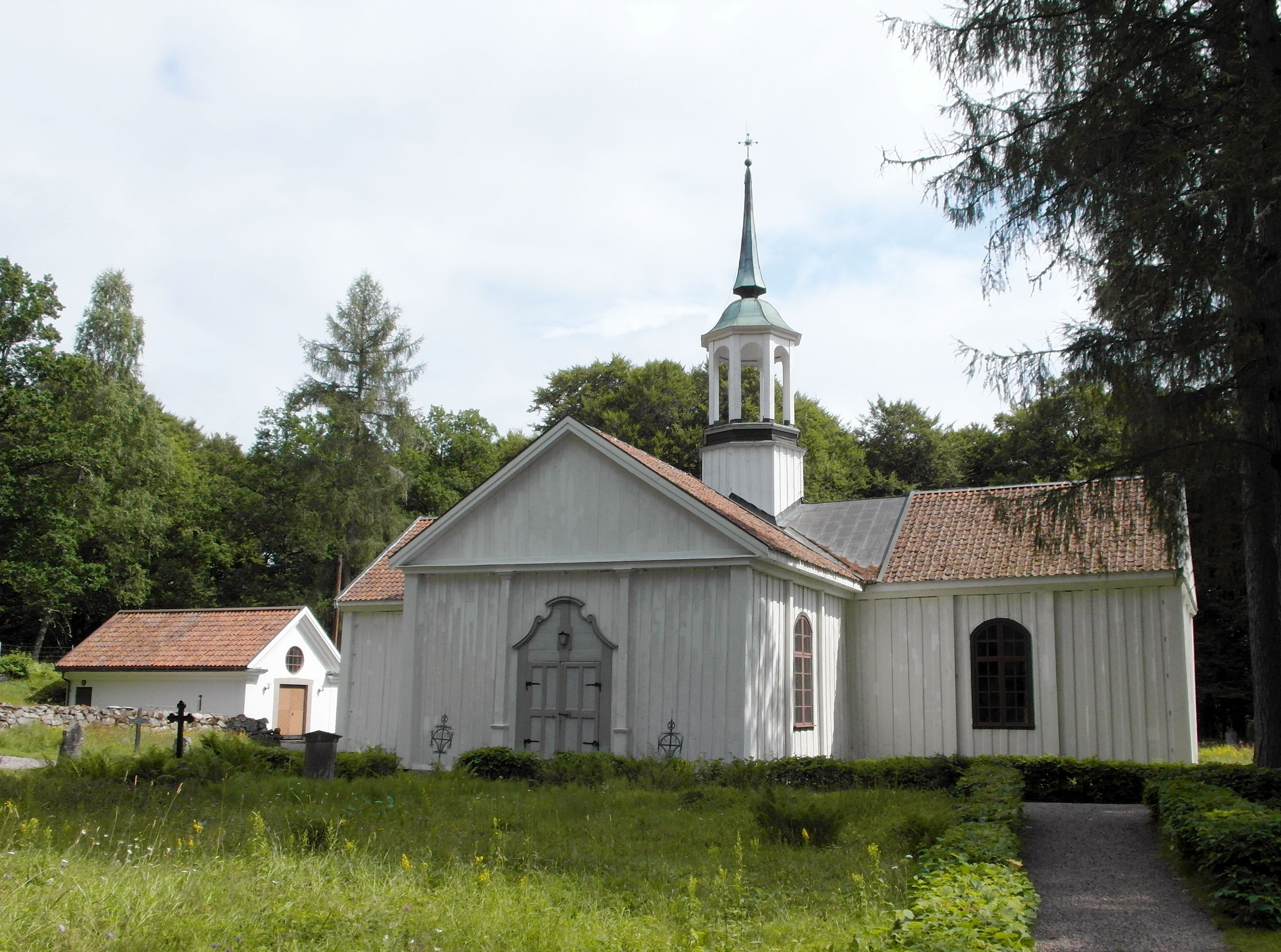 Bo Kyrka, Hallsbergs kommun, Närke, Sverige, juli 2013